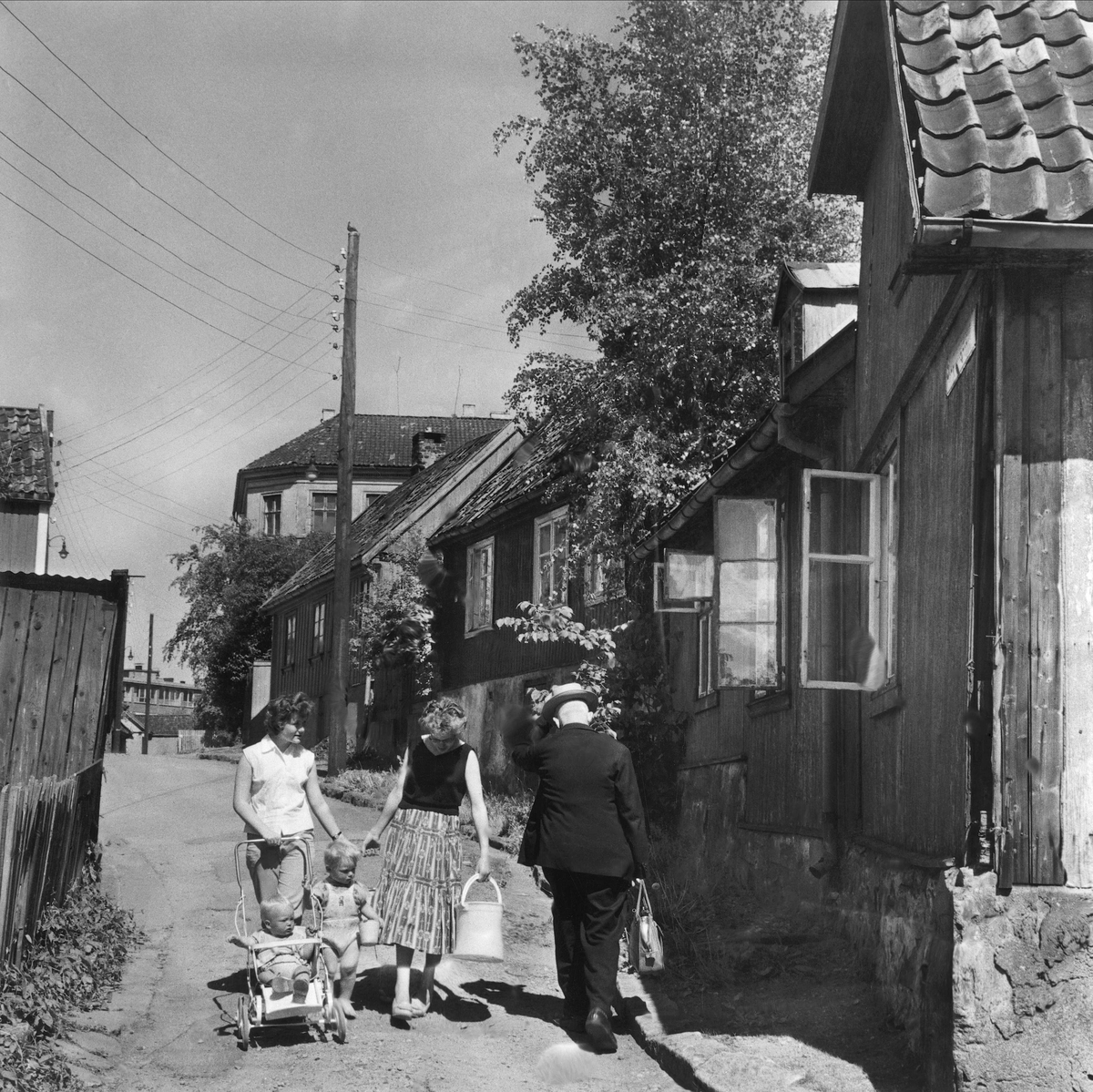 Stupinngata på Enerhaugen, 1959